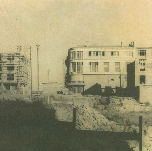 Le Comoedia en 1949